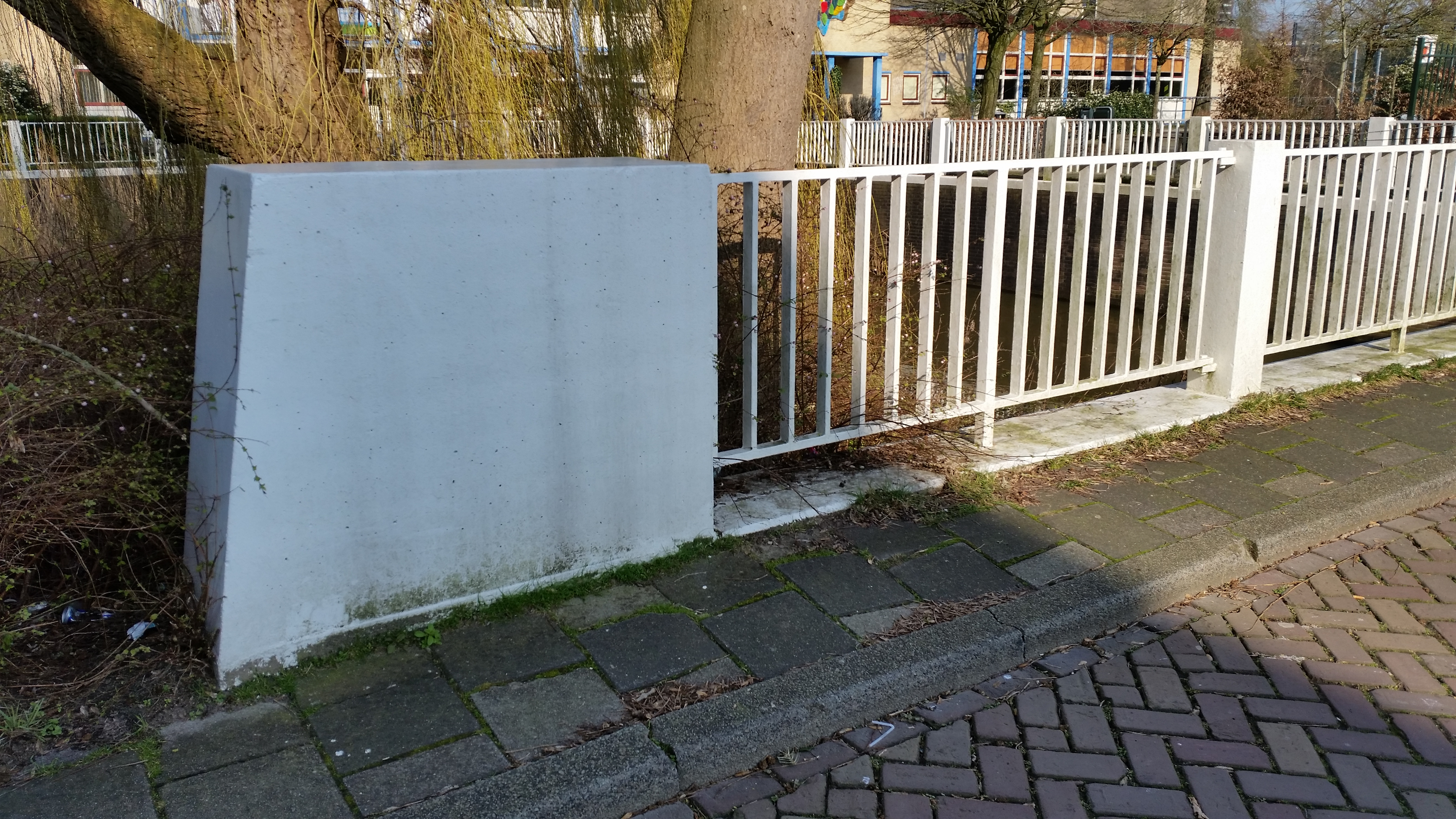 Impressie van brug 271 nabij de Rutherfordstraat in Watergraafsmeer (maart 2020)